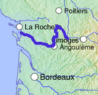 Kaart van de Charente op basis van Wikimedia Commons file - zelf gemaakt